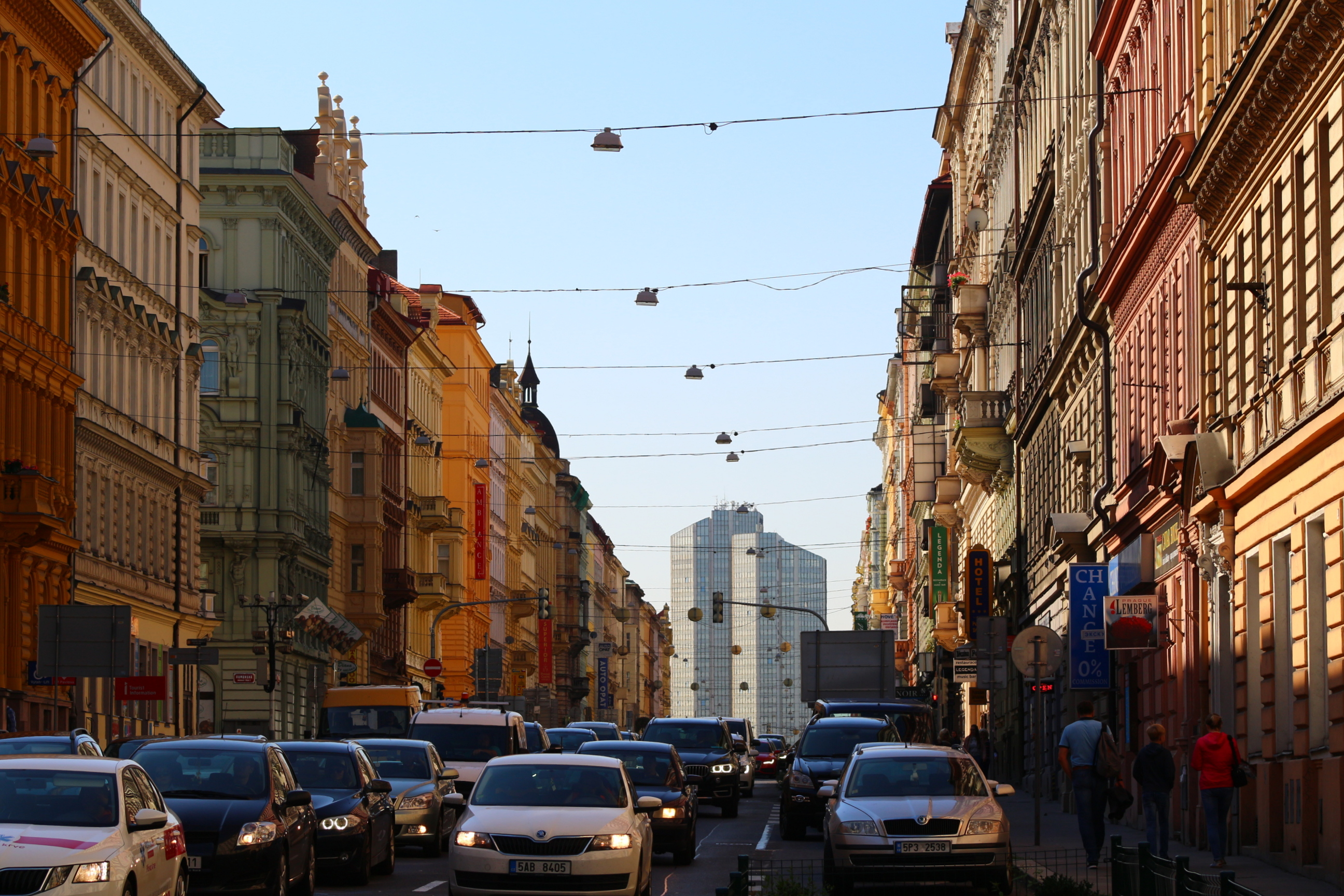 Praha Legerova ulice